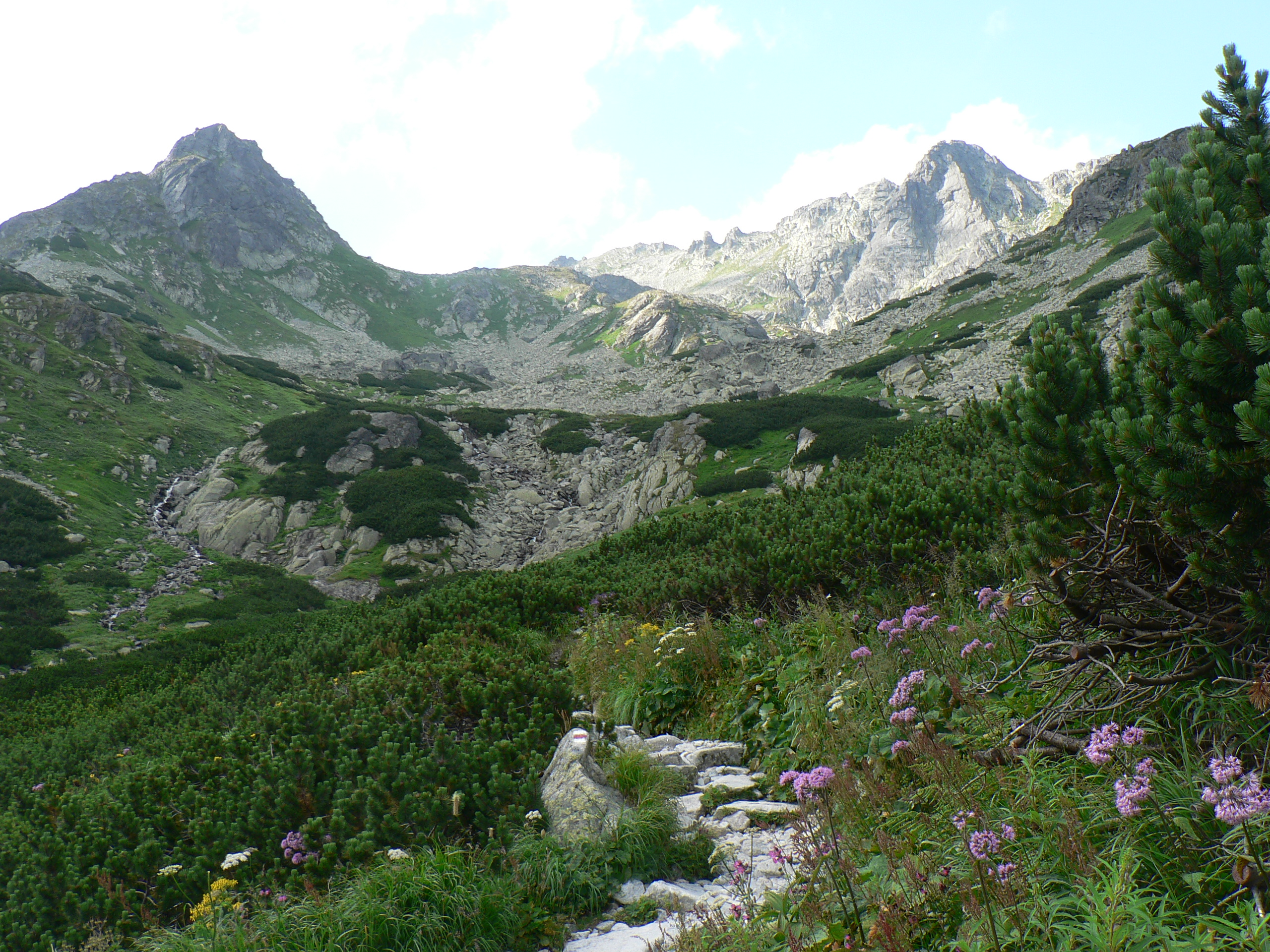 Wołowiec Mięguszowiecki i Wołowa Turnia